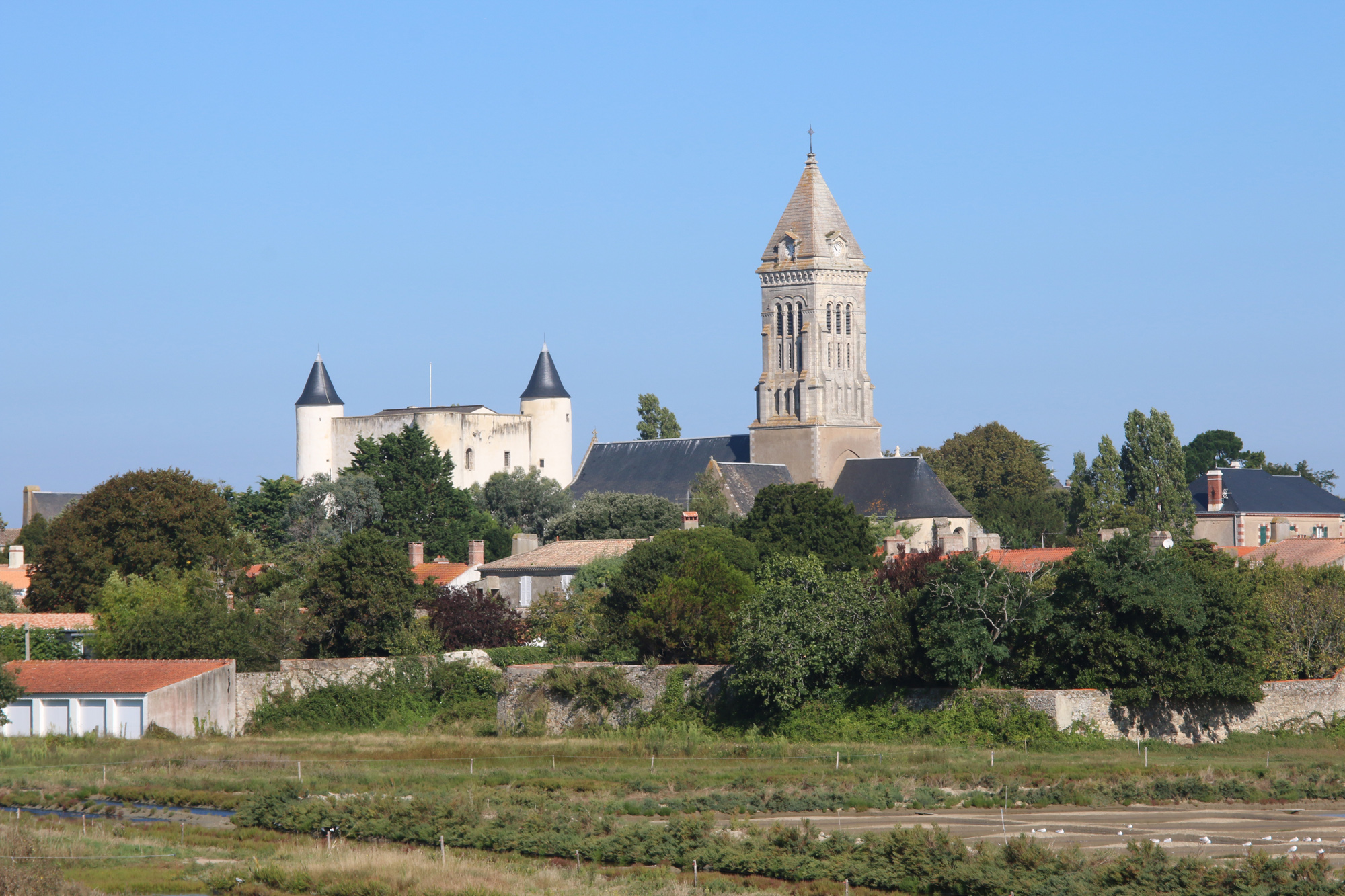 Église et château de Noirmoutier-en-Île